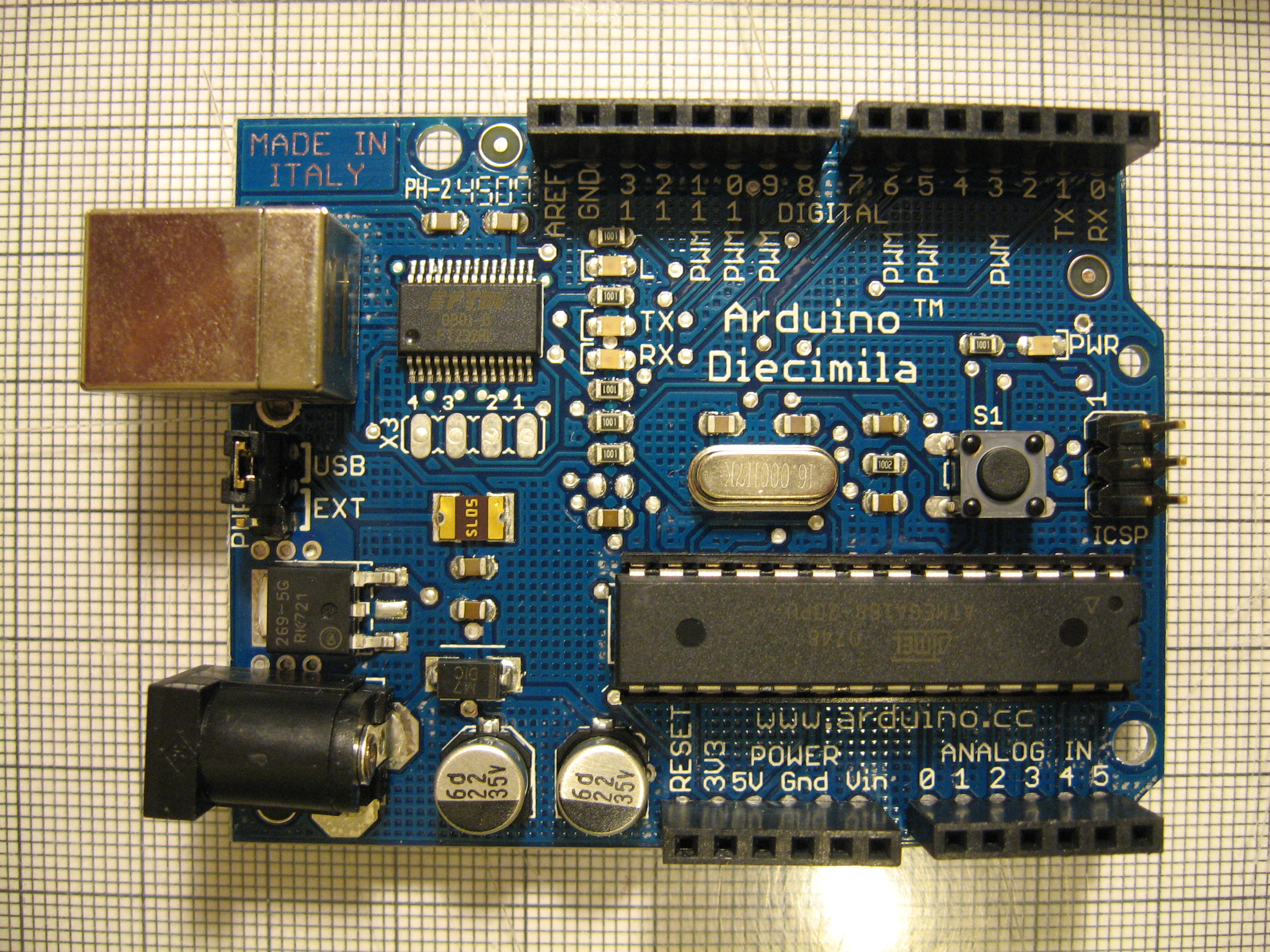 Arduino Diecimila Board - front view